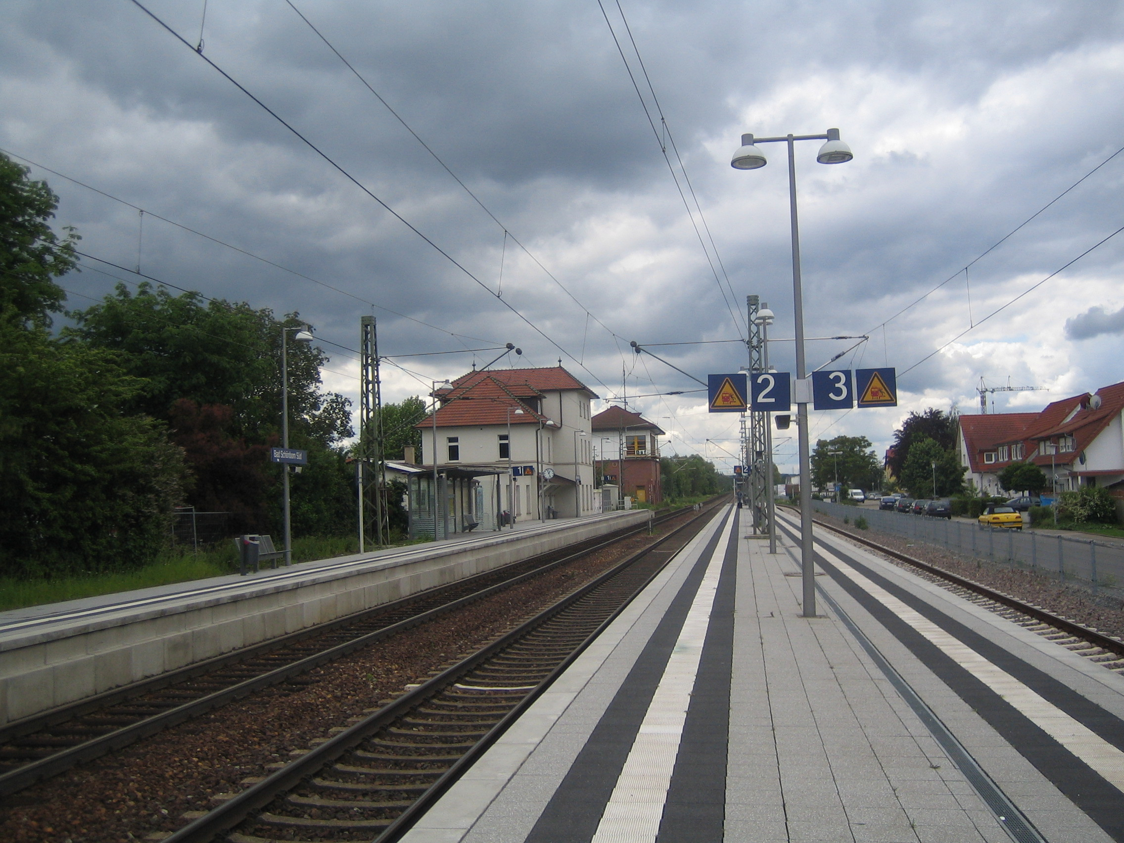 Bahnhof Bad Schönborn Süd